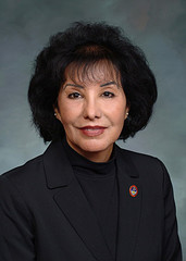 Colorado state representative Stella Garza-Hicks